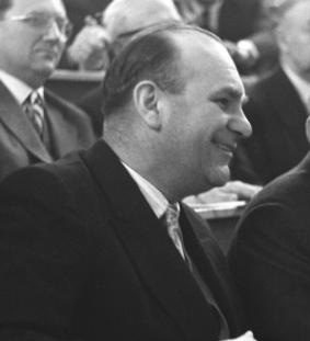 Zentralbild/Leipzig 27.4.1958 Tagung der Physikalischen Gesellschaft im Physikalischen Institut der Karl-Marx-Universität Leipzig Die Hauptjahrestagung der Physikalischen Gesellschaft in der DDR begann am 27.4.1958 in Leipzig im Physikalischen Institut der Karl-Marx-Universität, an der zahlreiche namhafte Wissenschaftler aus dem Ausland und aus Westdeutschland teilnehmen. UBz: Leninpreisträger Prof. Barwich (links) im Gespräch mit Prof. Dr. Havemann von der Humboldt-Universität Berlin.